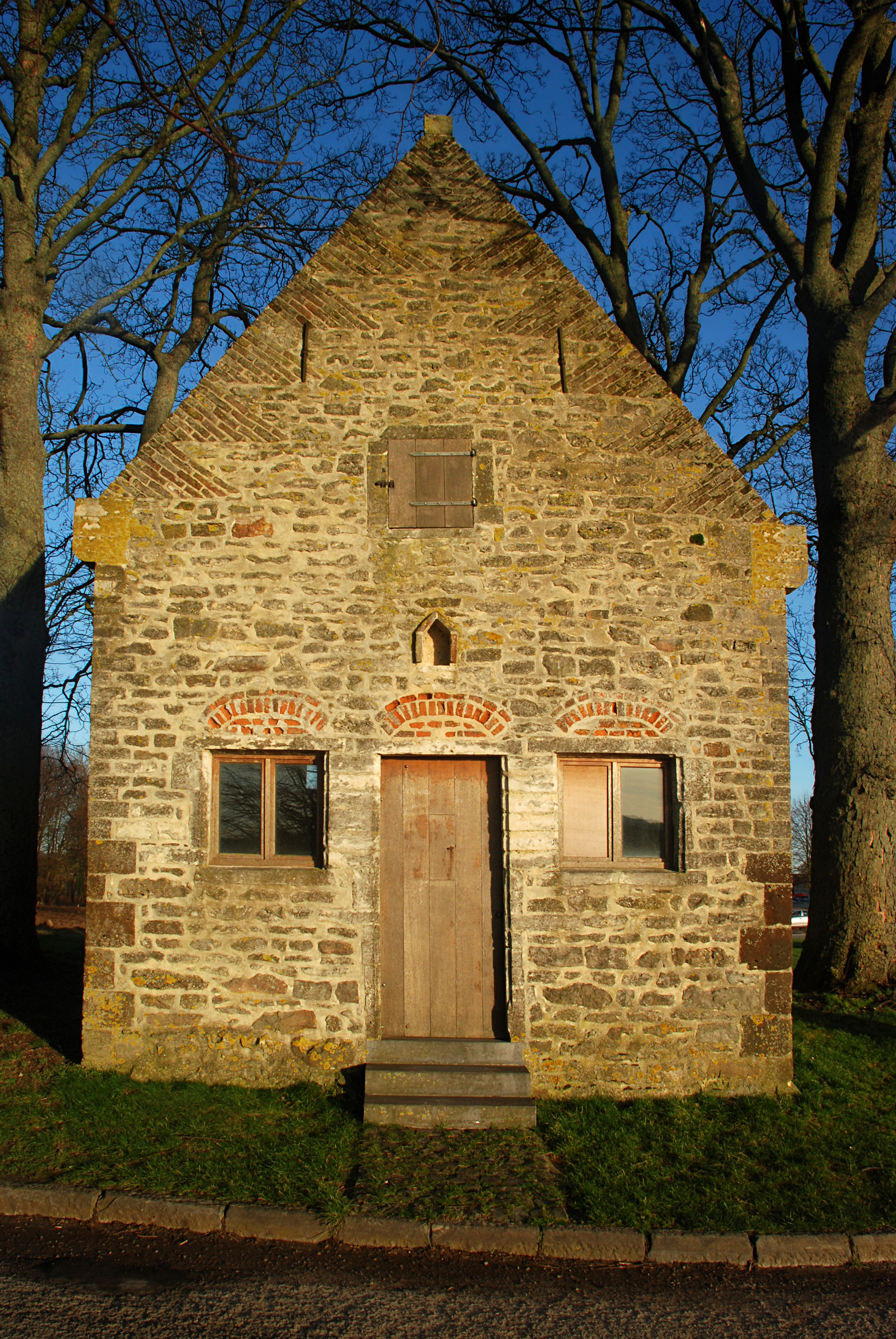 Belgique - Brabant wallon - Chaumont-Gistoux - Longueville - Chapelle du Chêneau